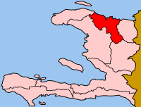 Map of Haiti showing Nord department. Map of Haiti showing Nord department. Made by User:Golbez from PD sources.